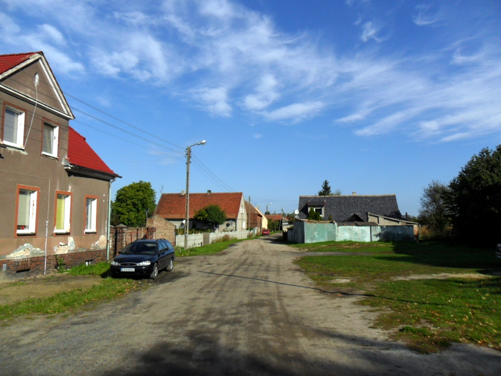 Sękowice